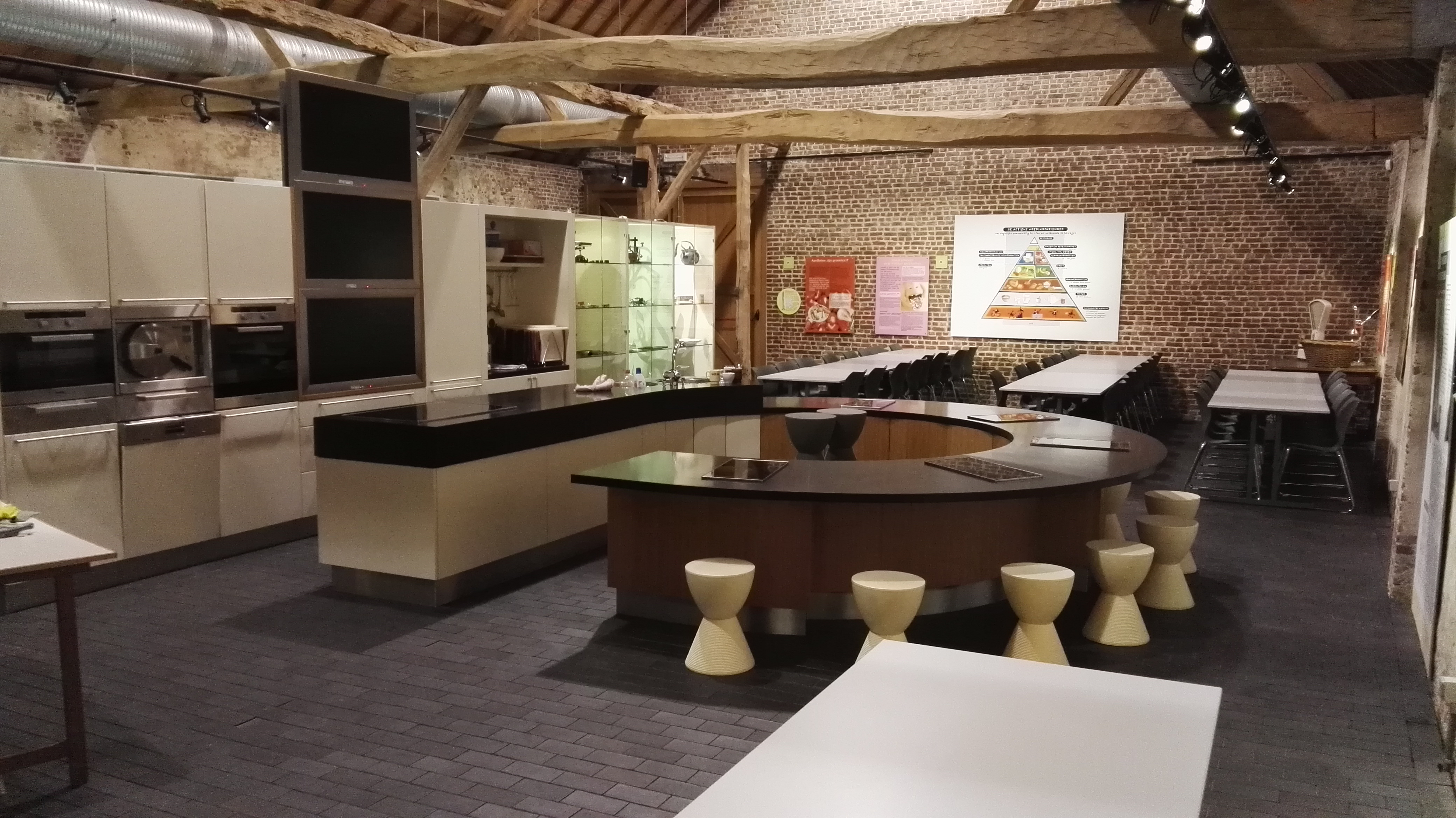 kookeiland